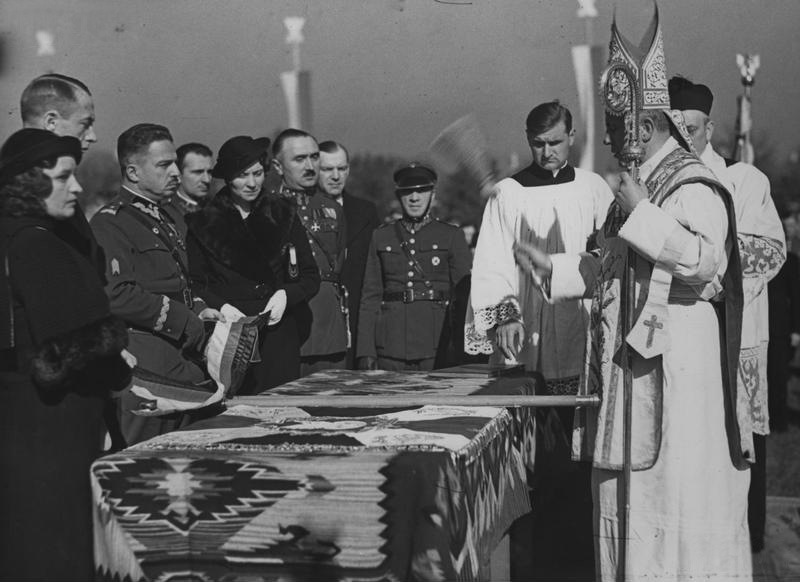 Biskup polowy Józef Gawlina poświęca sztandar powiatowi grodzkiemu Warszawa-Śródmieście Związku Strzeleckiego. Widoczny także gen. Czesław Jarnuszkiewicz (3 z lewej).